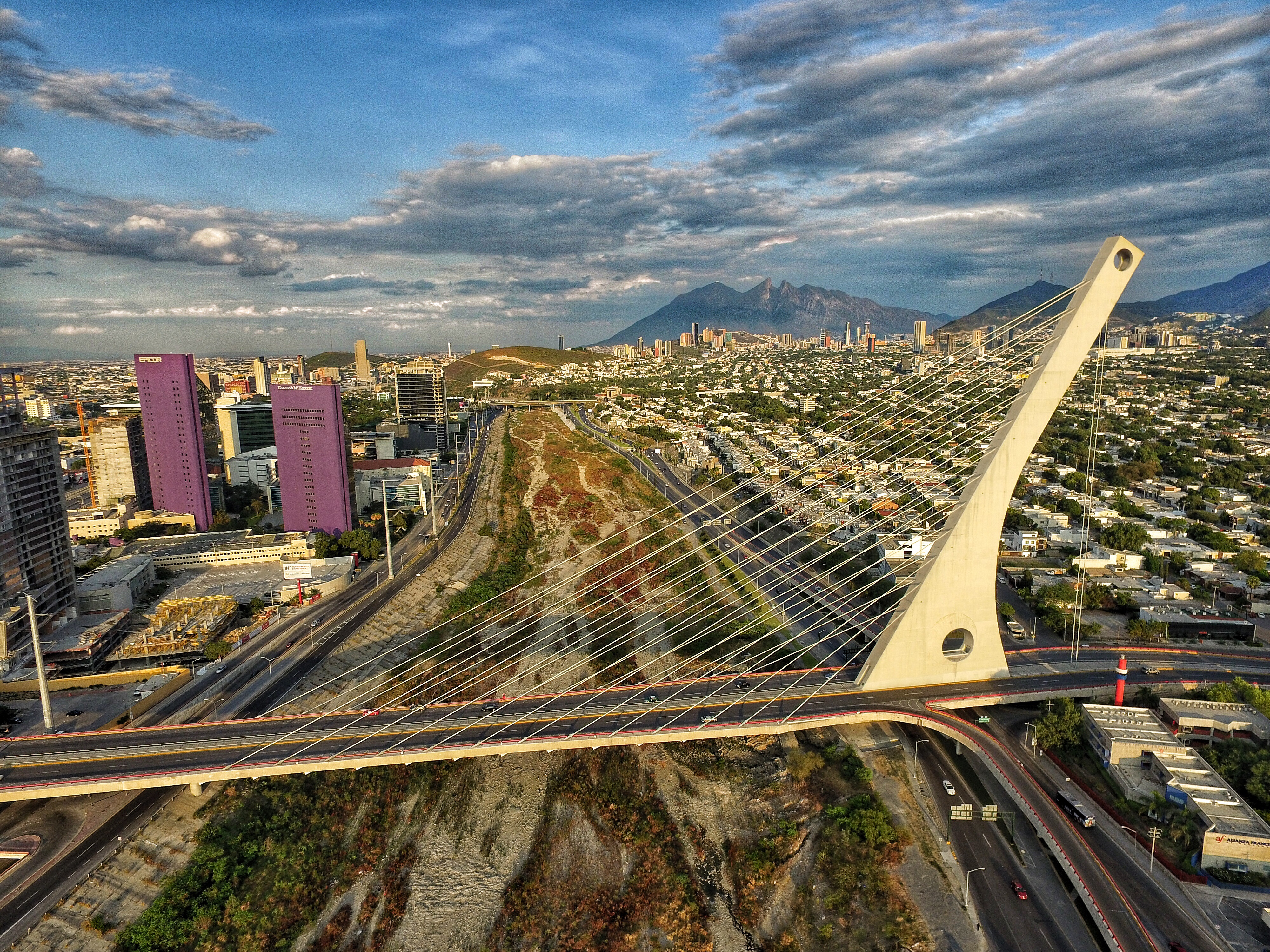 Puente Atirantado, San Pedro Garza Garcia, Nuevo León, México